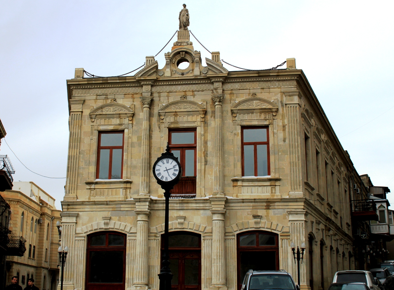 Часы на ондой из площядей